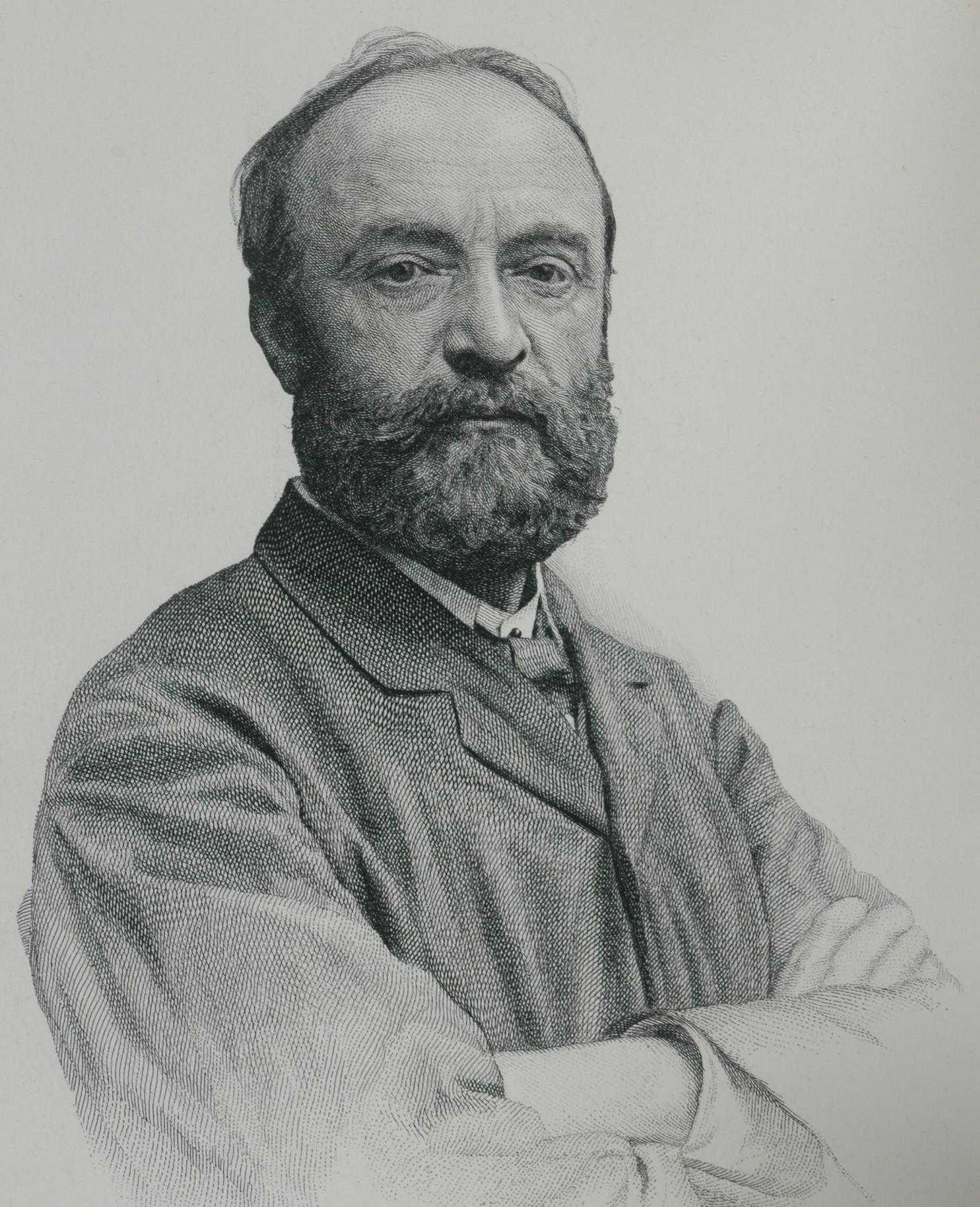 Uit: Levenschets van Michiel-Karel VerlatSchrijver: Max Rooses (overleden 1914)Uitgave: 1895